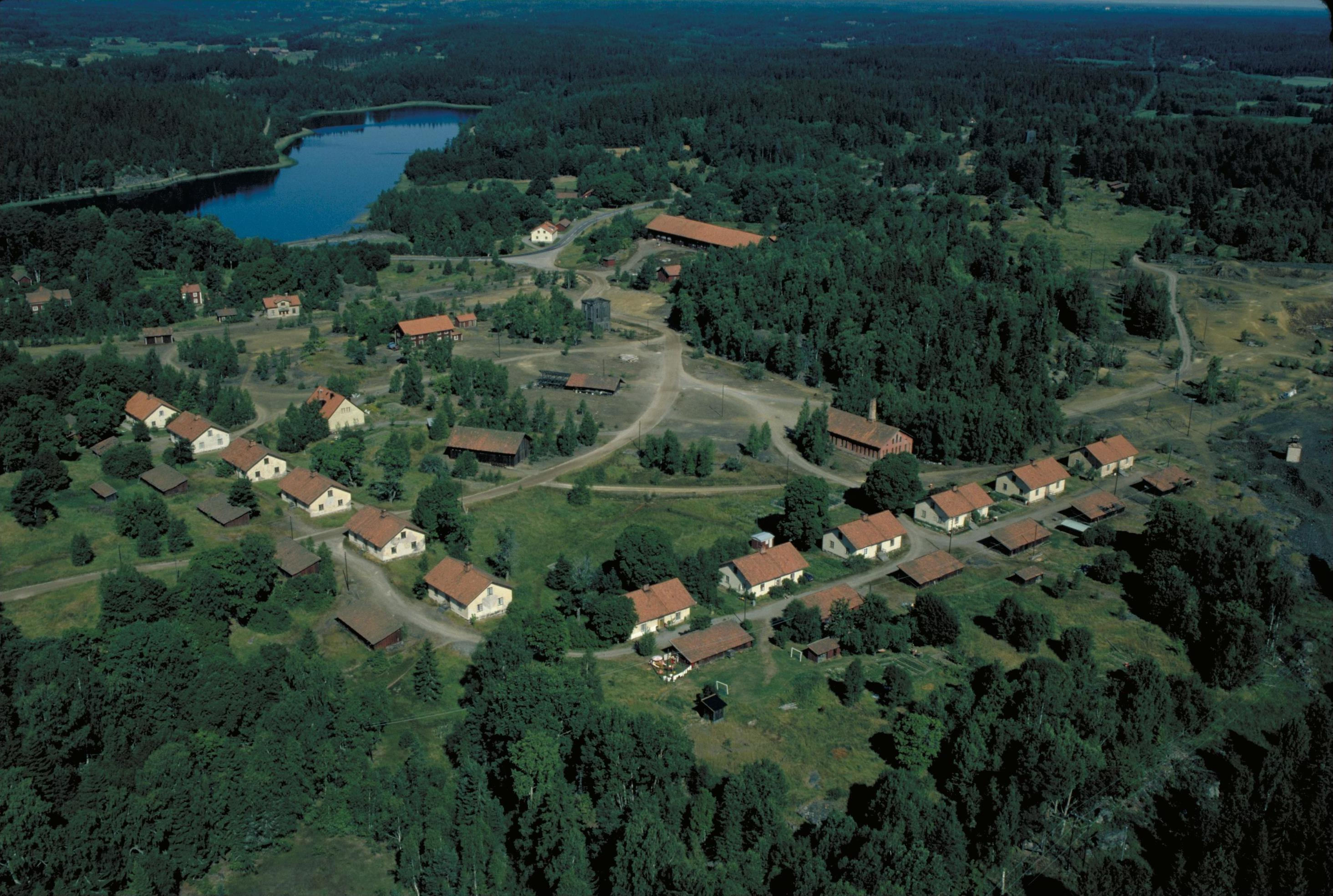 Bilden troligen från början av 1980-talet. Motiv: Bersbo Nyckelord: Flygbilder, Industriminnen, Riksintressen Kategori: Gruvområde Bilden troligen från början av 1980-talet.